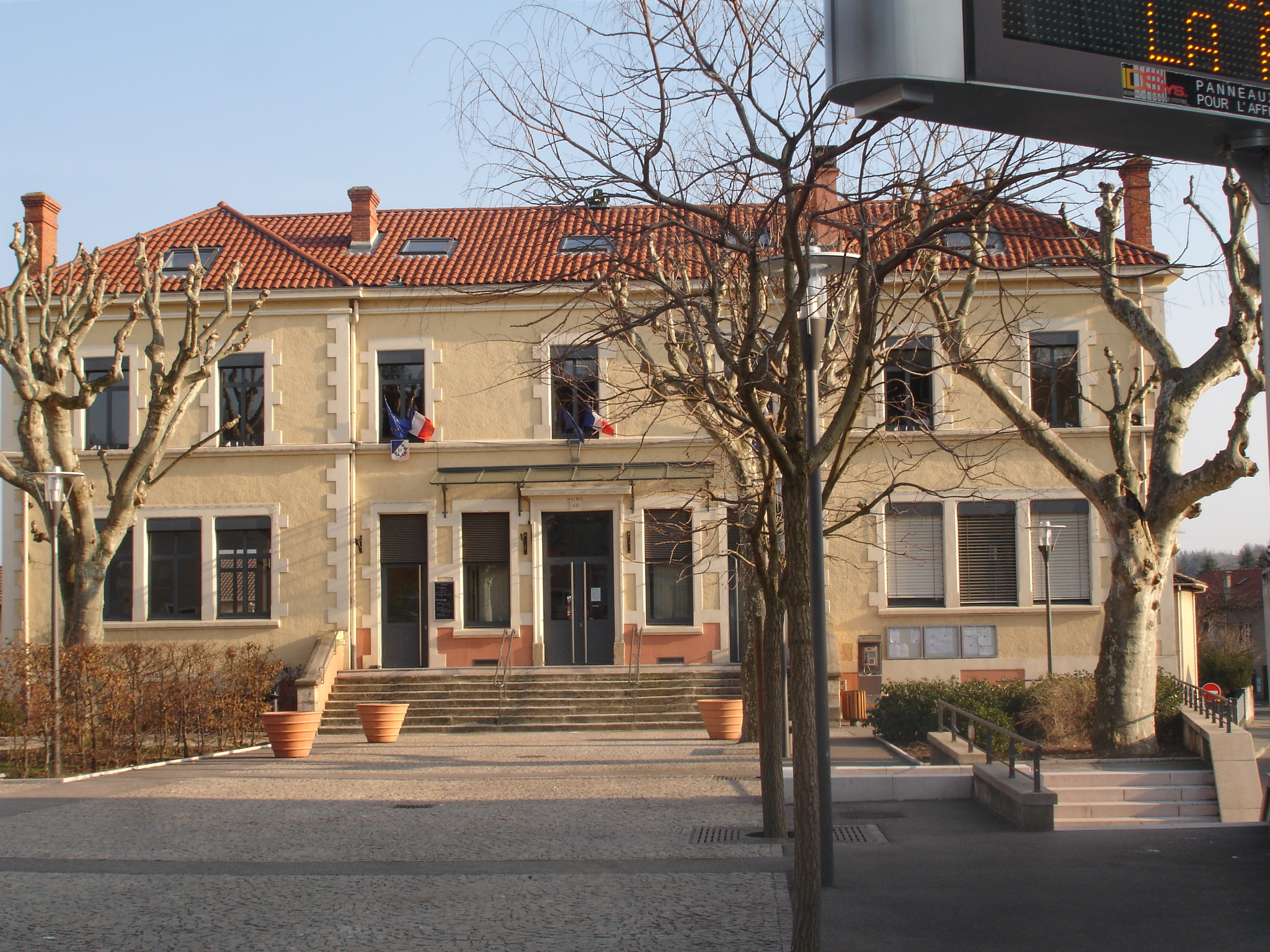 Communay (69) : LA MAIRIE